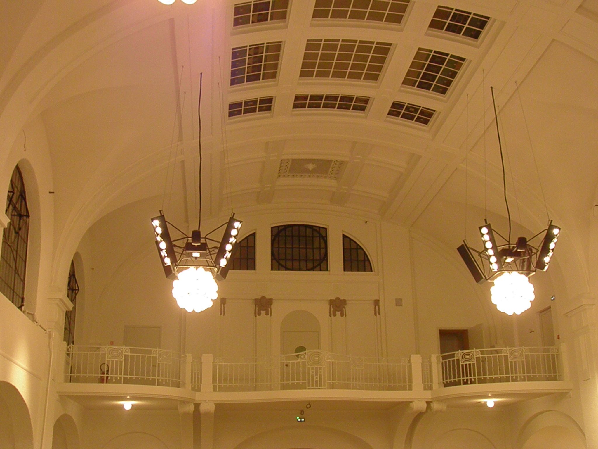 Anciens bains municipaux après restauration dans la rue d'Unterlinden à Colmar (Haut-Rhin, France).